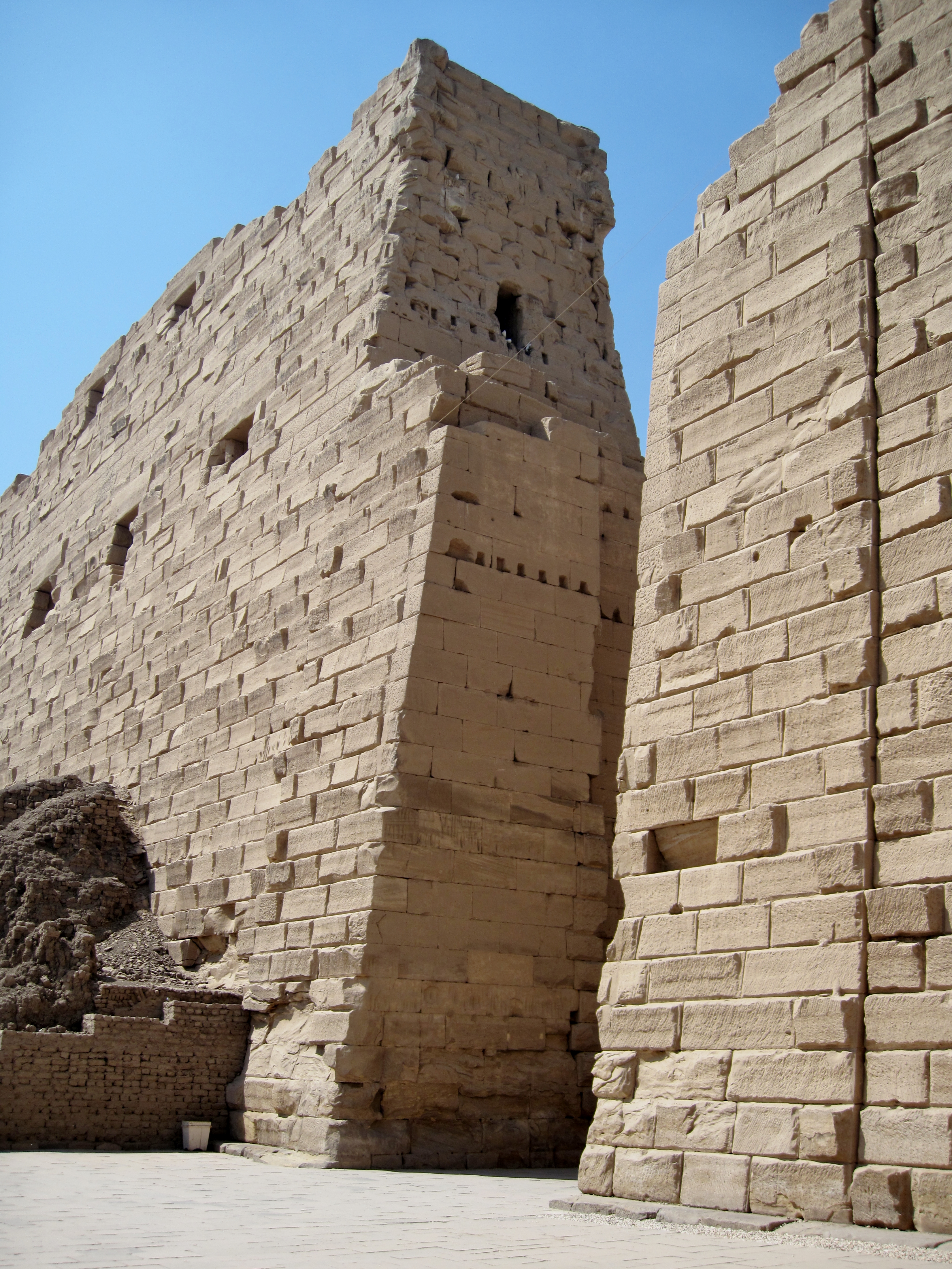 Erster Pylon des Tempels von Karnak, nördlich von Luxor, Ägypten